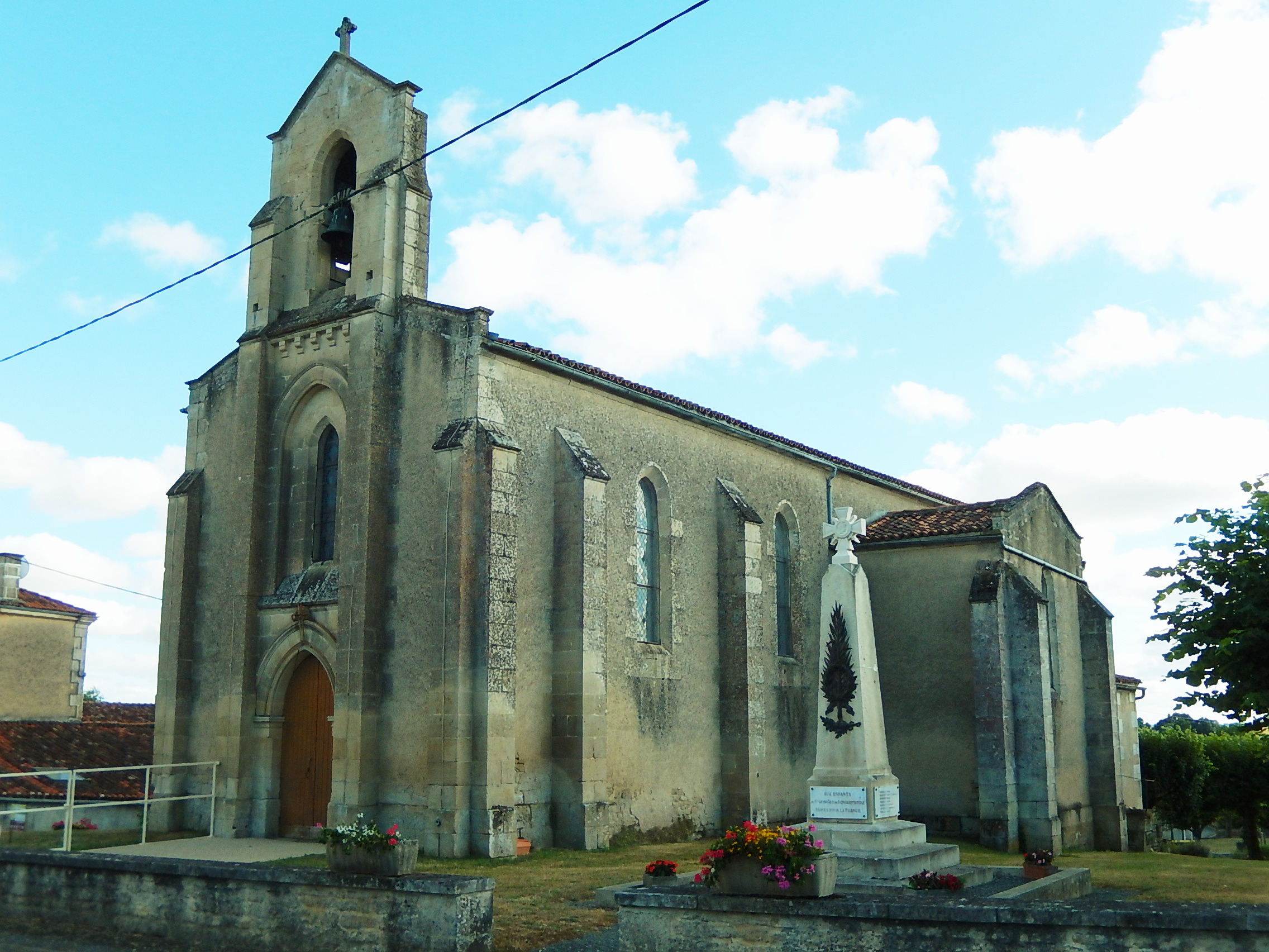 L'église Saint Georges, et le monument aux morts, à Saint-Georges-de-Longuepierre.